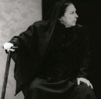 Minerva Mena. En el papel de Bernarda Alba de la obra "La casa de Bernarda Alba" de García Lorca